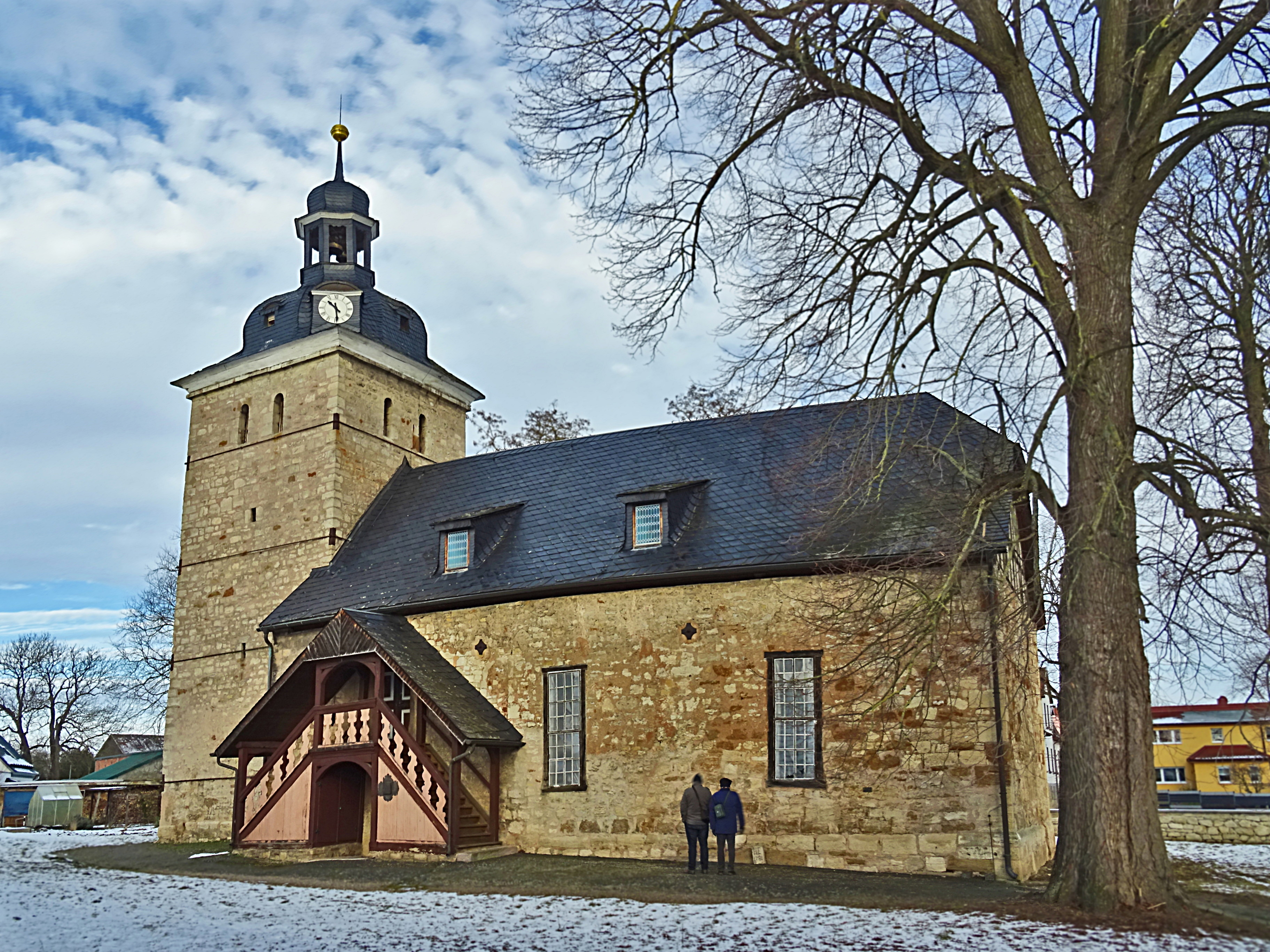 Kirche Gloria Deo in Hohenebra von Süden